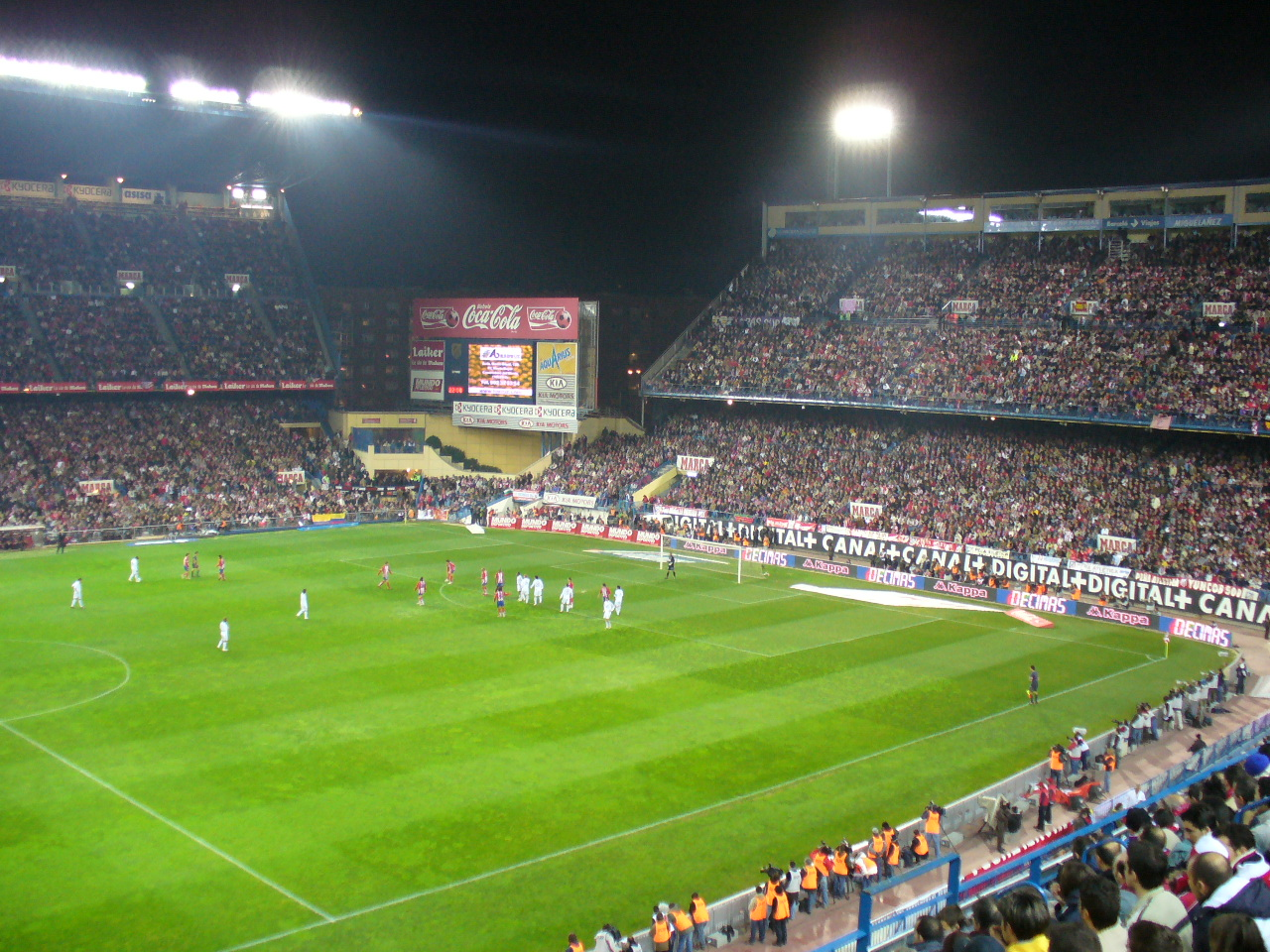 Estádio do Atlético de Madrid. Atletico de Madrid 1 X 1 Real Madrid.